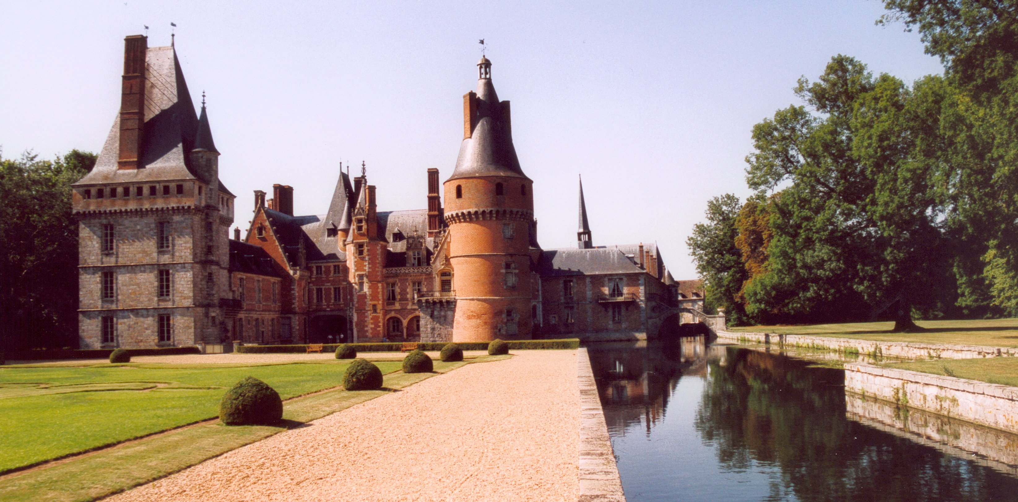 France Eure-et-Loir Maintenon Le château Photographie prise par GIRAUD Patrick